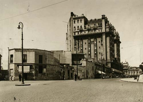 Vista de las casas bajas que ocupaban los terrenos en donde se construyó en 1933 el Edificio Kavanagh, gran rascacielos sudamericano. Al fondo, el Plaza Hotel inaugurado en 1909.